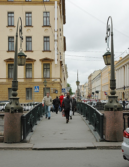 Italian (Italianskii) bridge. St Petersburg, Griboedova channel.